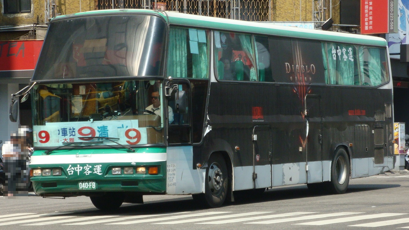 台中客運040-FB行駛台中市公車9路